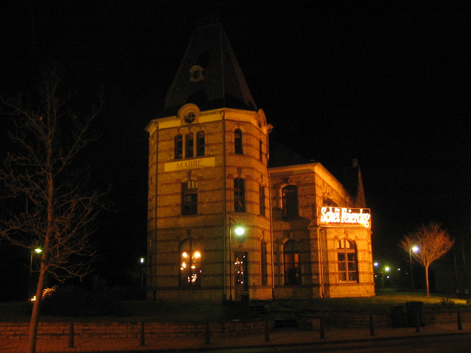 Das Rathaus von Wasserbillig.Wasserbillig, Mairie